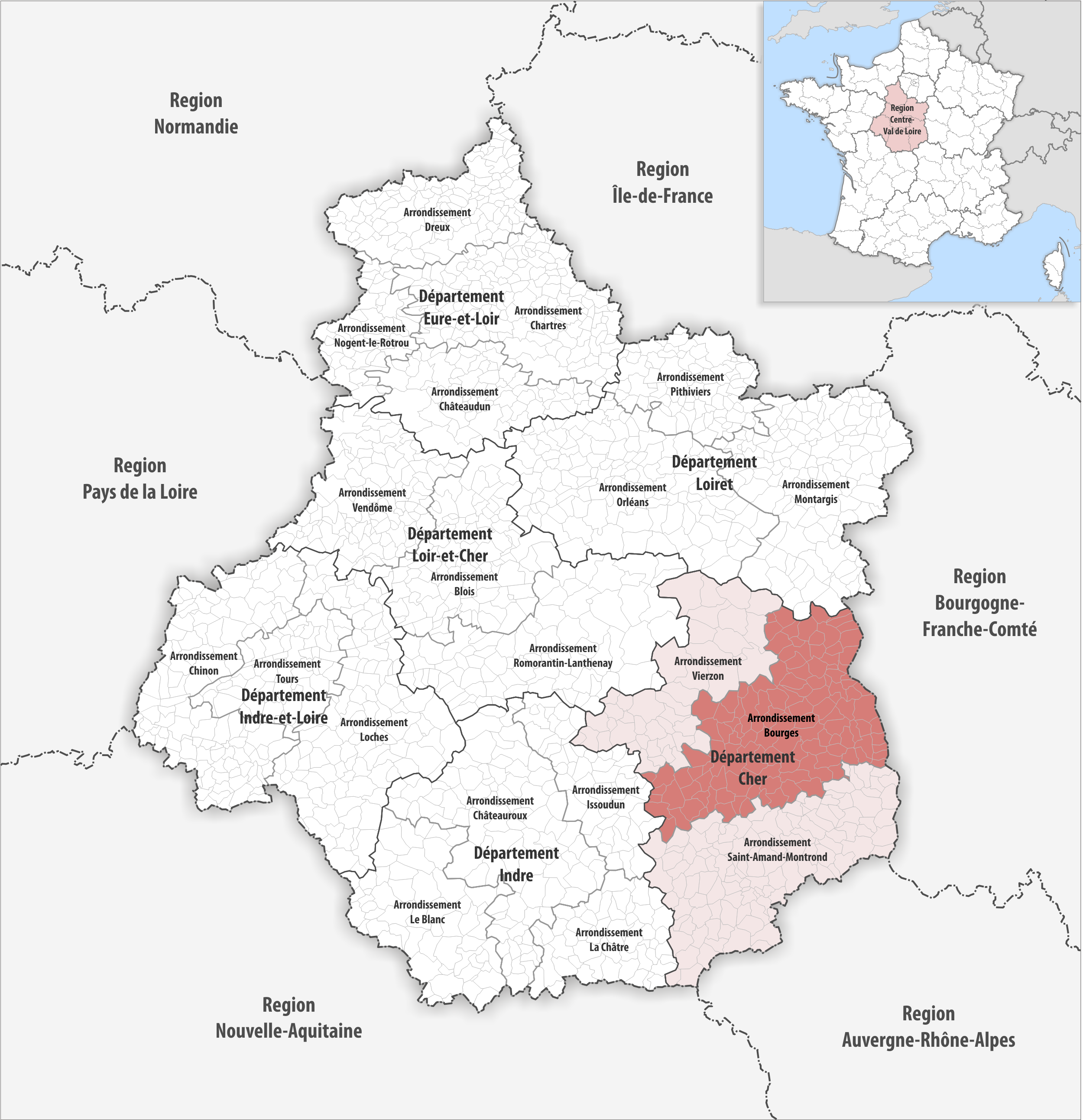 Lage des Arrondissements Bourges